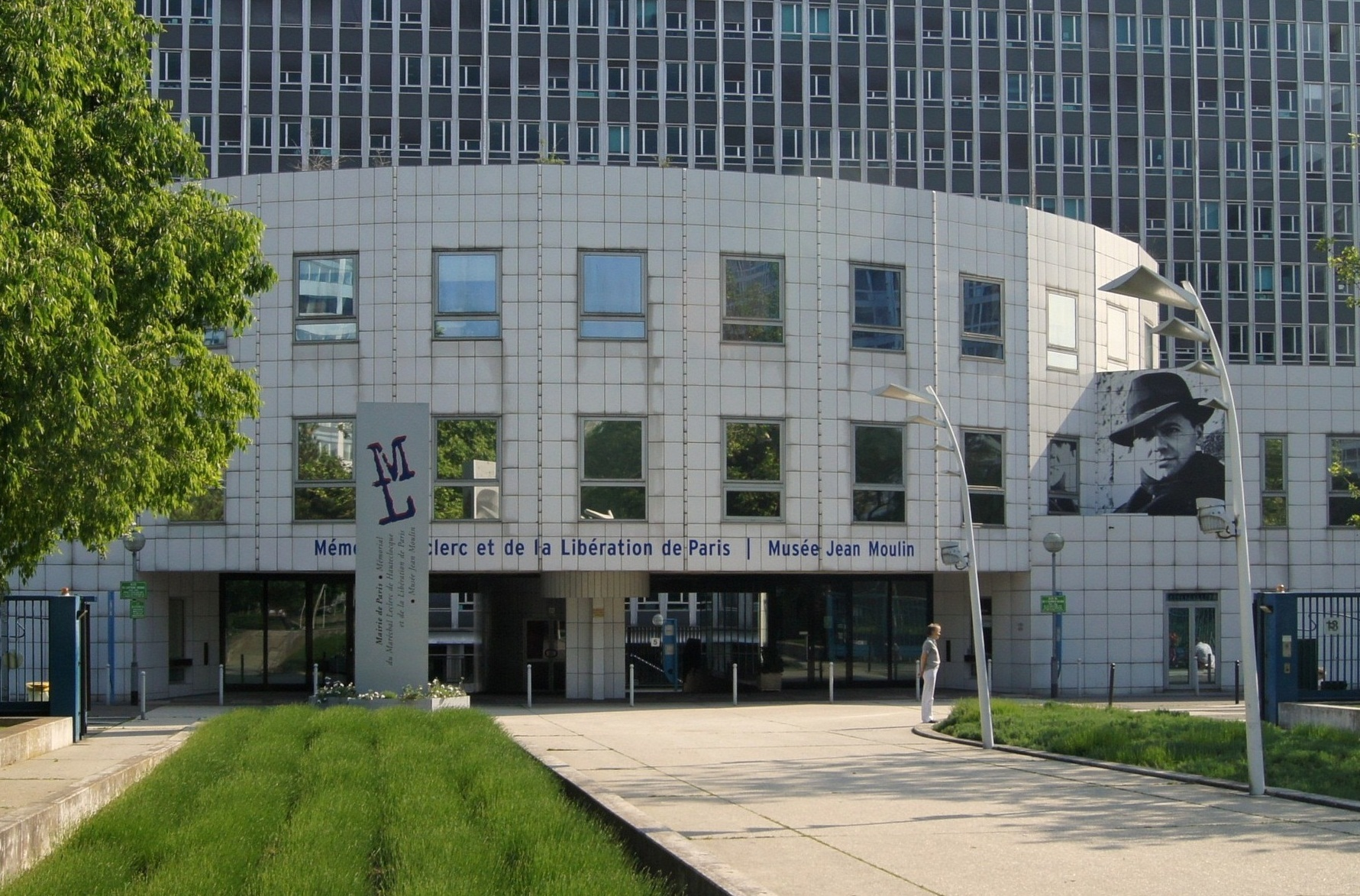 L'entrée du musée Jean Moulin, Paris